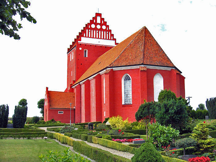 fra sydøst